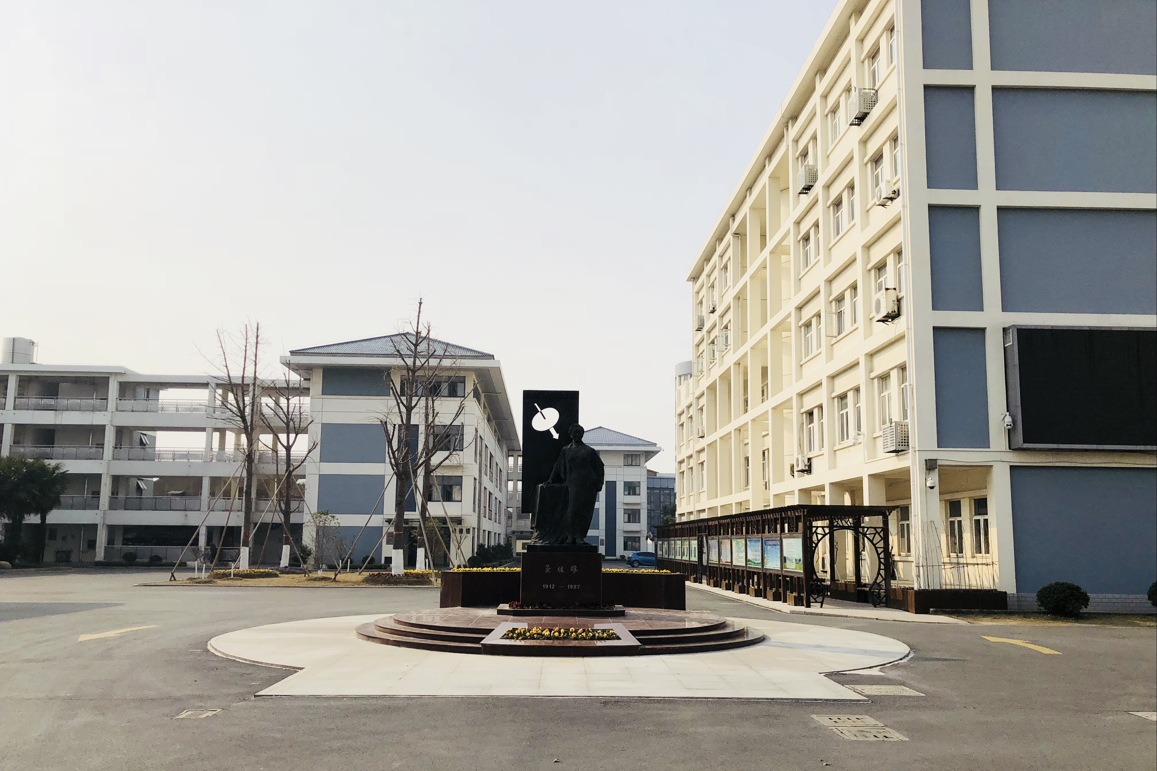 中文（中国大陆）: 浏河镇明德中学 吴健雄像